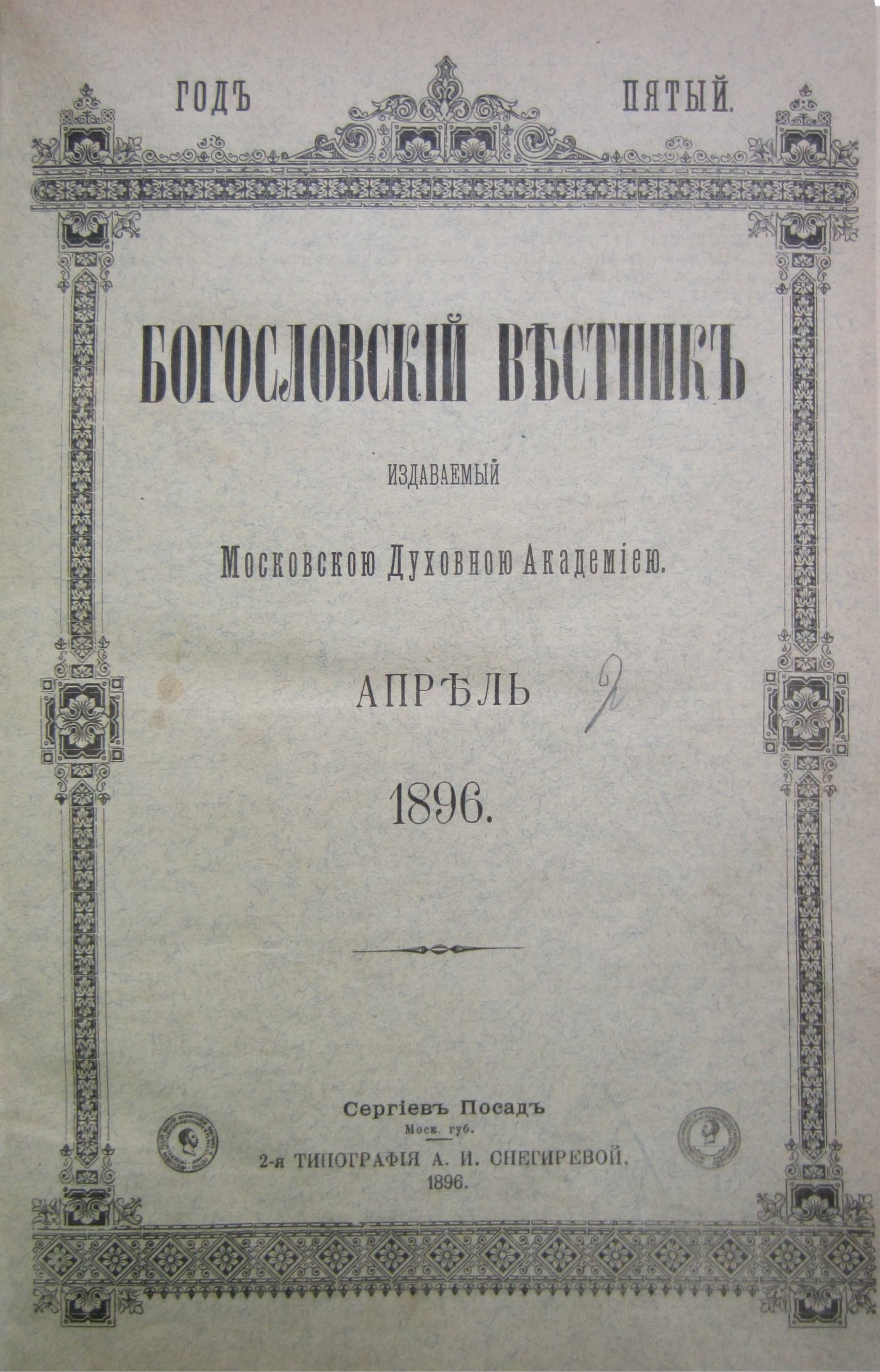 Богословский вестник 1896, апрель